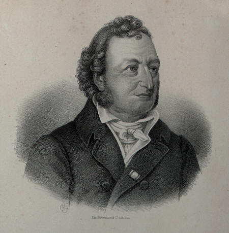 Knud Lyne Rahbek